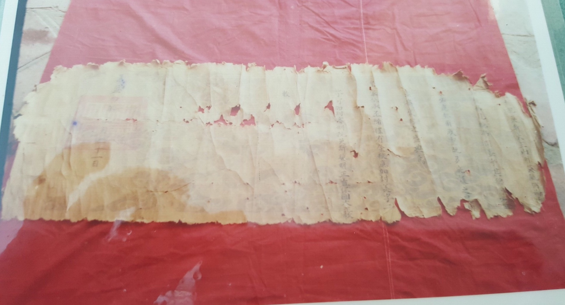 Đây là một trong những bản sắc phong của Tiến sĩ Phan Nhân Tường, triều Lê Trang Tông còn lưu giữ đến ngày nay (Tư liệu của Ban quản lý di tích Nghệ An)